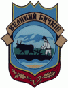 Герб смт Великий Бичків